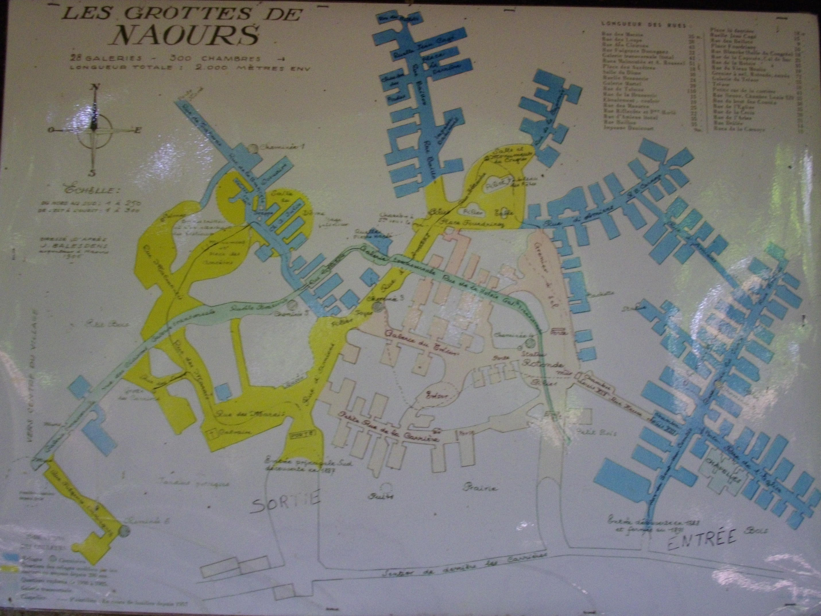 Plan du réseau des muches de Naours